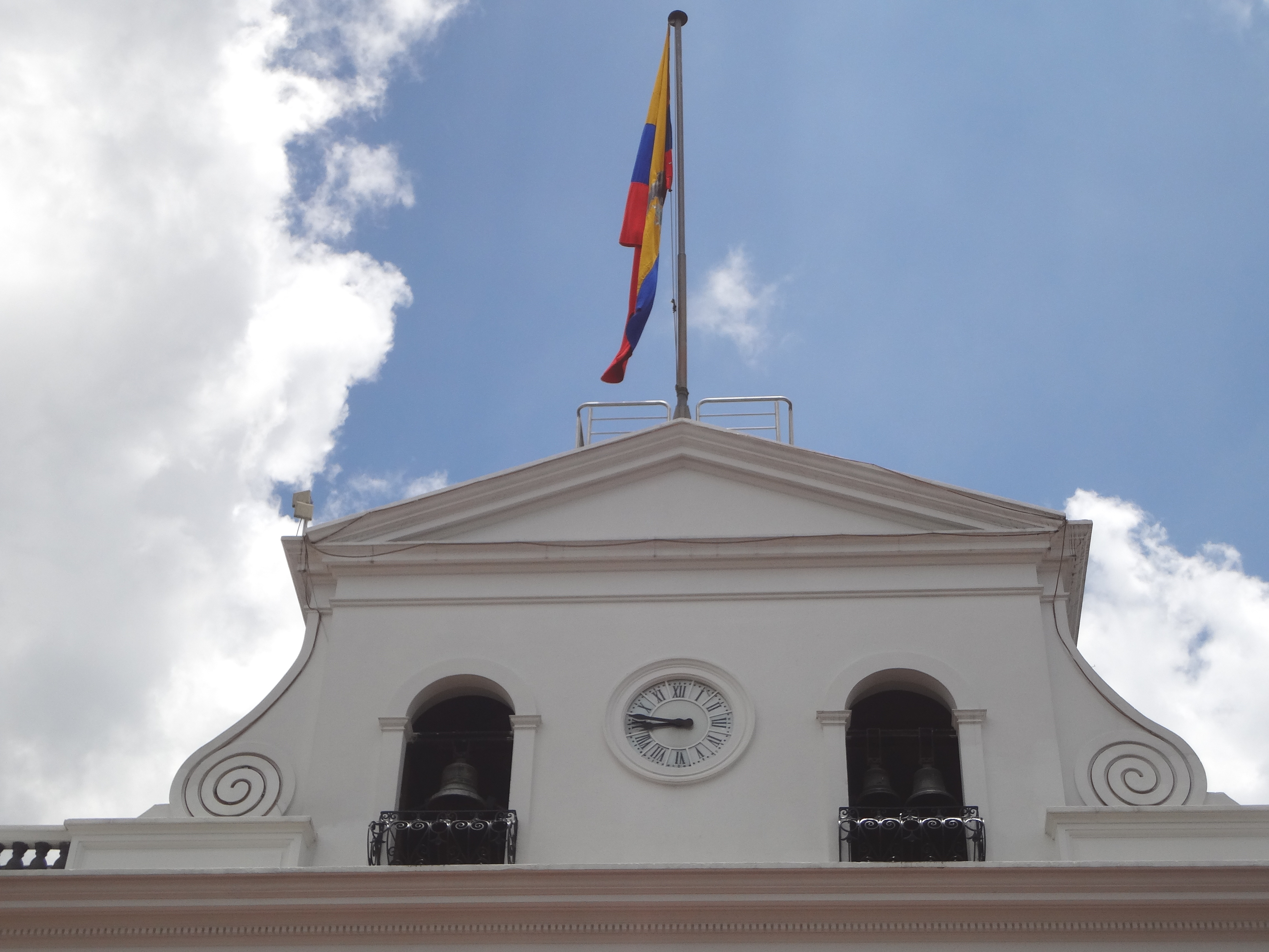 Otra obra realizada por el Presidente García Moreno fue el frontispicio central del Palacio de Carondelet, el cual posee un campanario y un reloj.